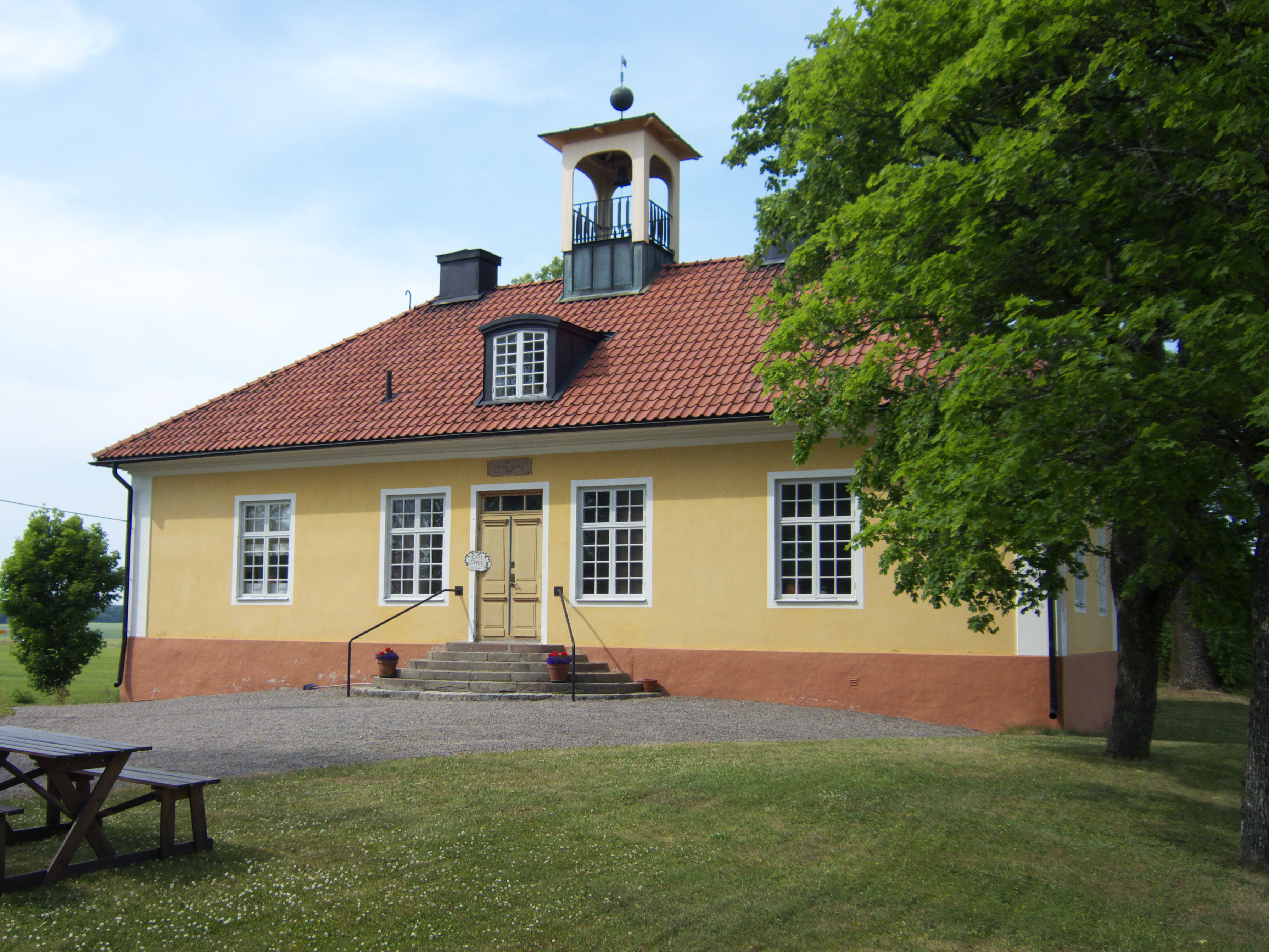 Karleby tingshus i Simtuna socken, Enköpings kommun, Uppsala län, Uppland, Sverige.